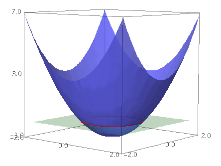 Potencia de un punto: gráfica 3D de los valores